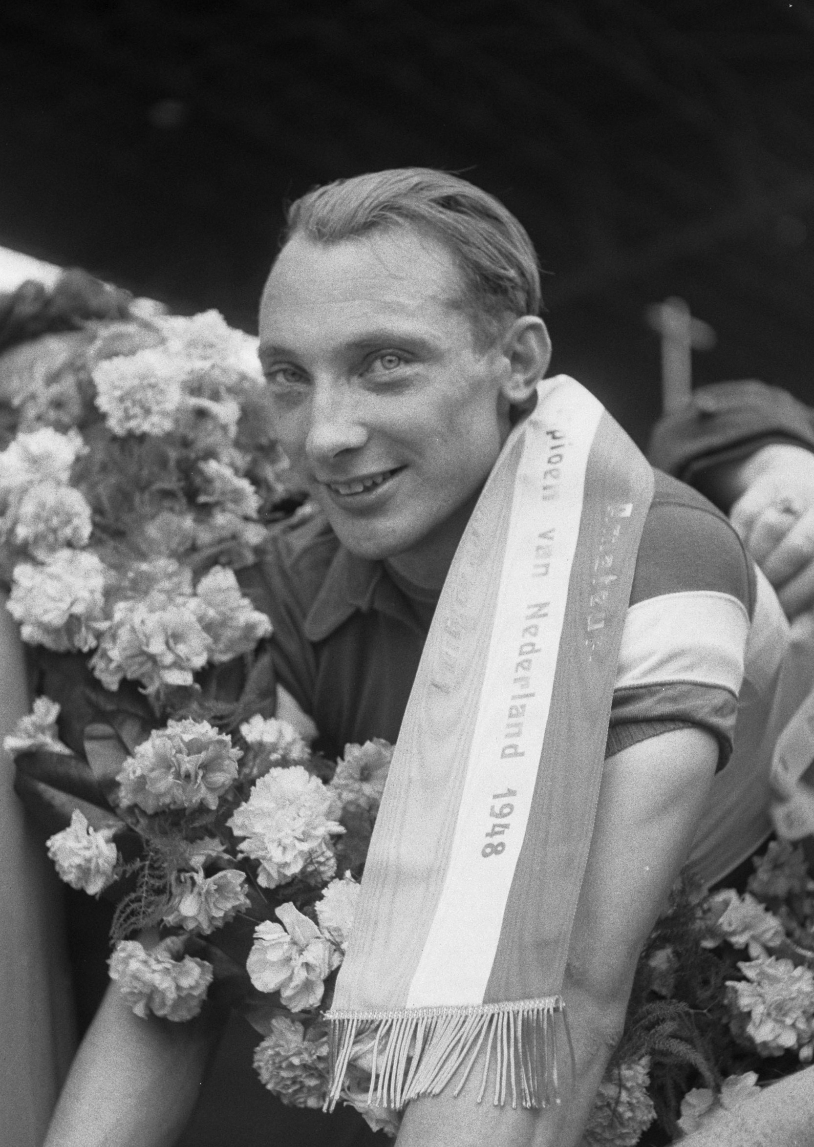 Wielerkampioenschappen. Blankenauw uit Nijmegen Kampioen achtervolging